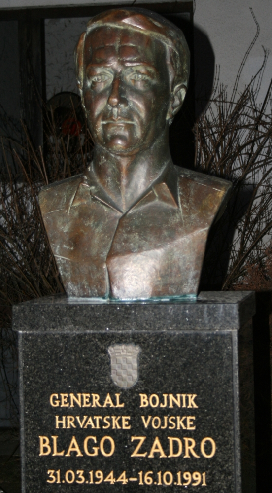 Bista Blaga Zadra na Trpinjskoj cesti